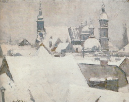 Blick auf Dom und Mausoleum, Grazer Dächer im Schneetitle QS:P1476,de:"Blick auf Dom und Mausoleum, Grazer Dächer im Schnee" label QS:Lde,"Blick auf Dom und Mausoleum, Grazer Dächer im Schnee"